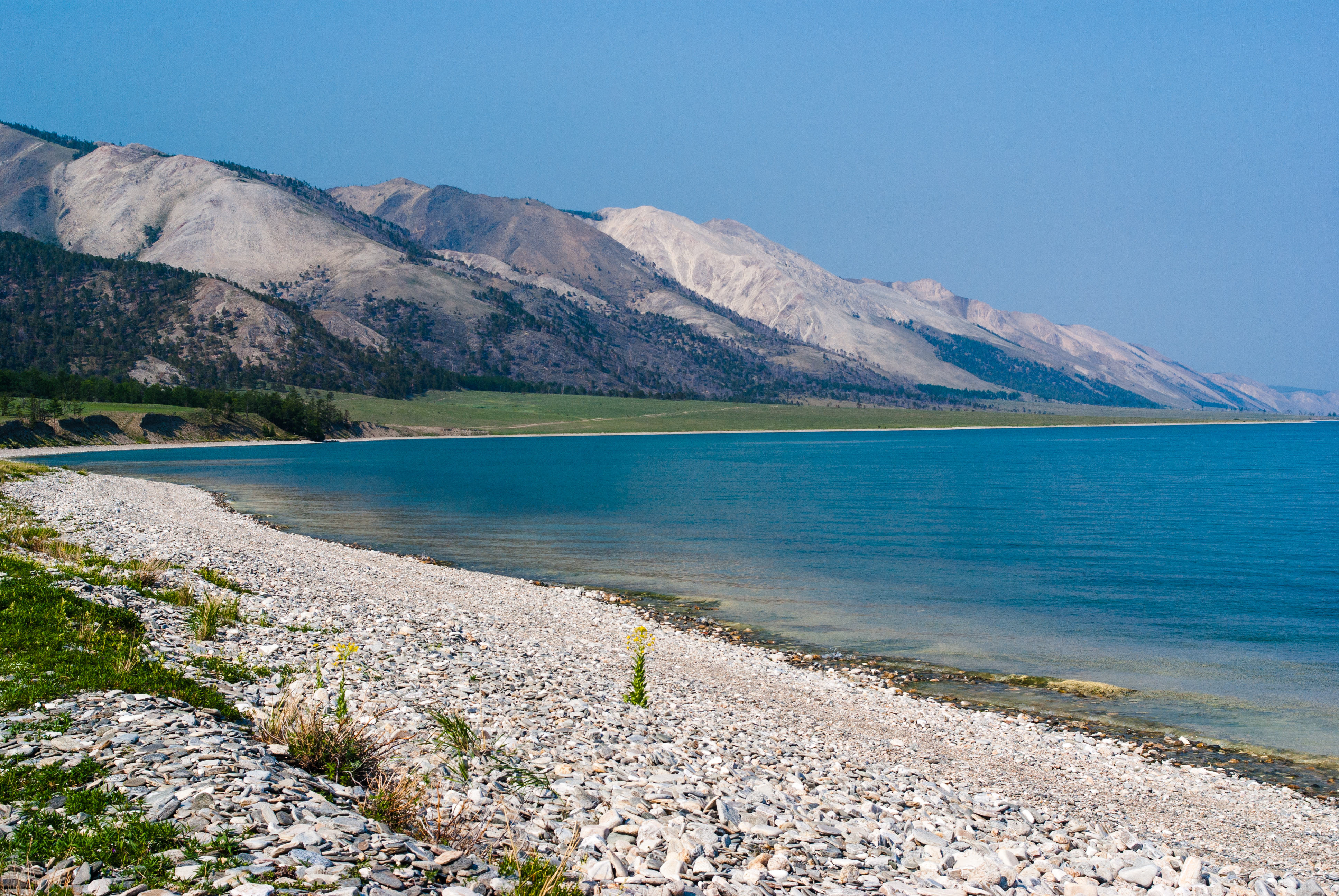 Прибайкальский: Территория парка в виде узкой полосы охватывает большую часть (около 470 км) западного побережья озера Байкал - от п. Култук на юге до мыса Кочериковского на севере. Можно сказать, что это самый "протяженный" из национальных парков России. Он занимает восточные склоны Приморского хребта, южную часть Олхинского плато, бассейн р. Большая Речка (впадает в р. Ангару), а также о. Ольхон. Южная часть парка рассечена вытекающей из Байкала могучей Ангарой.,Иркутский район, Иркутская область This image is related to the protected area of Russia number 3800118